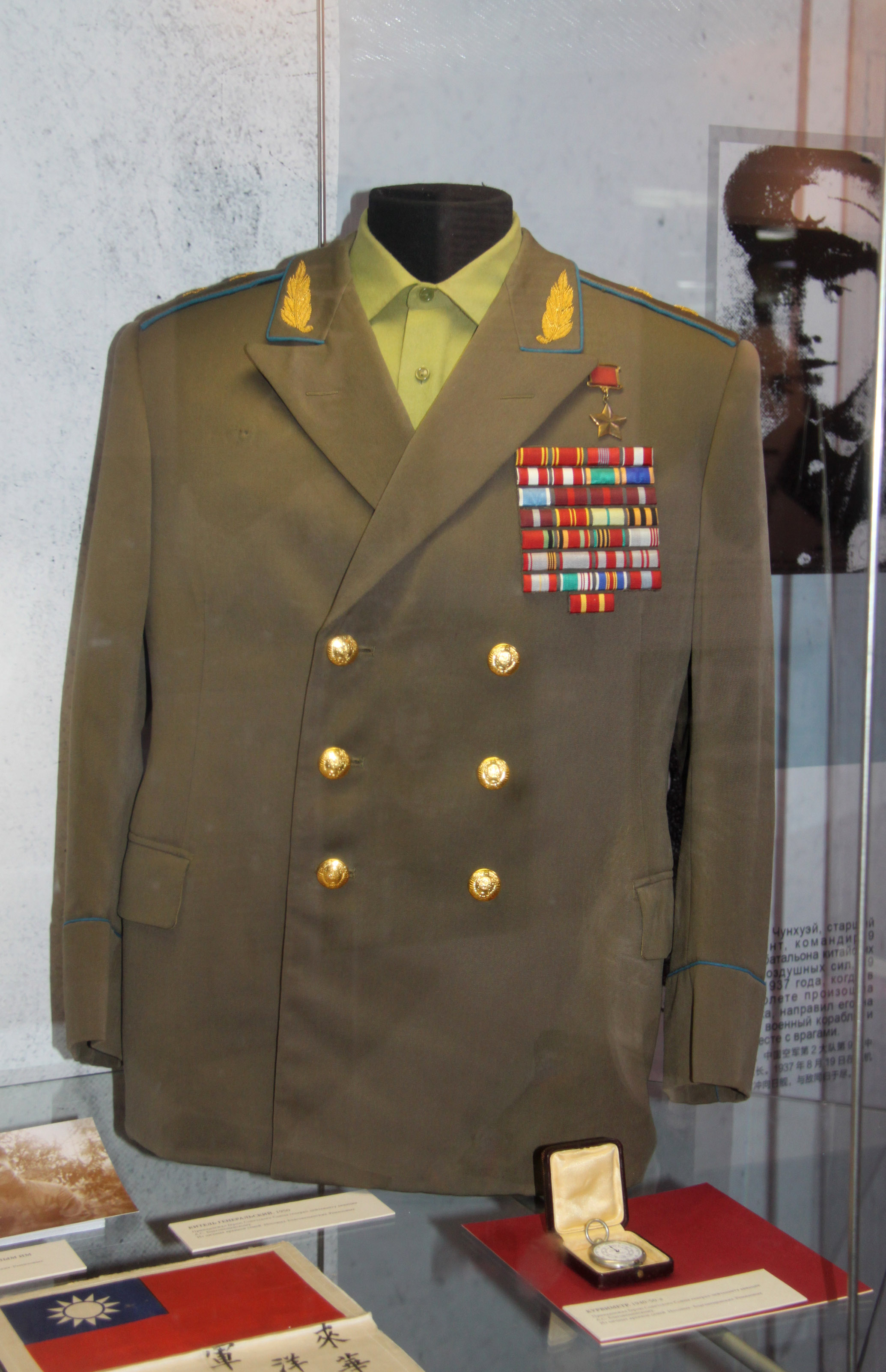 Китель Героя Советского Союза генерал-лейтенанта авиации Алексея Сергеевича Благовещенского